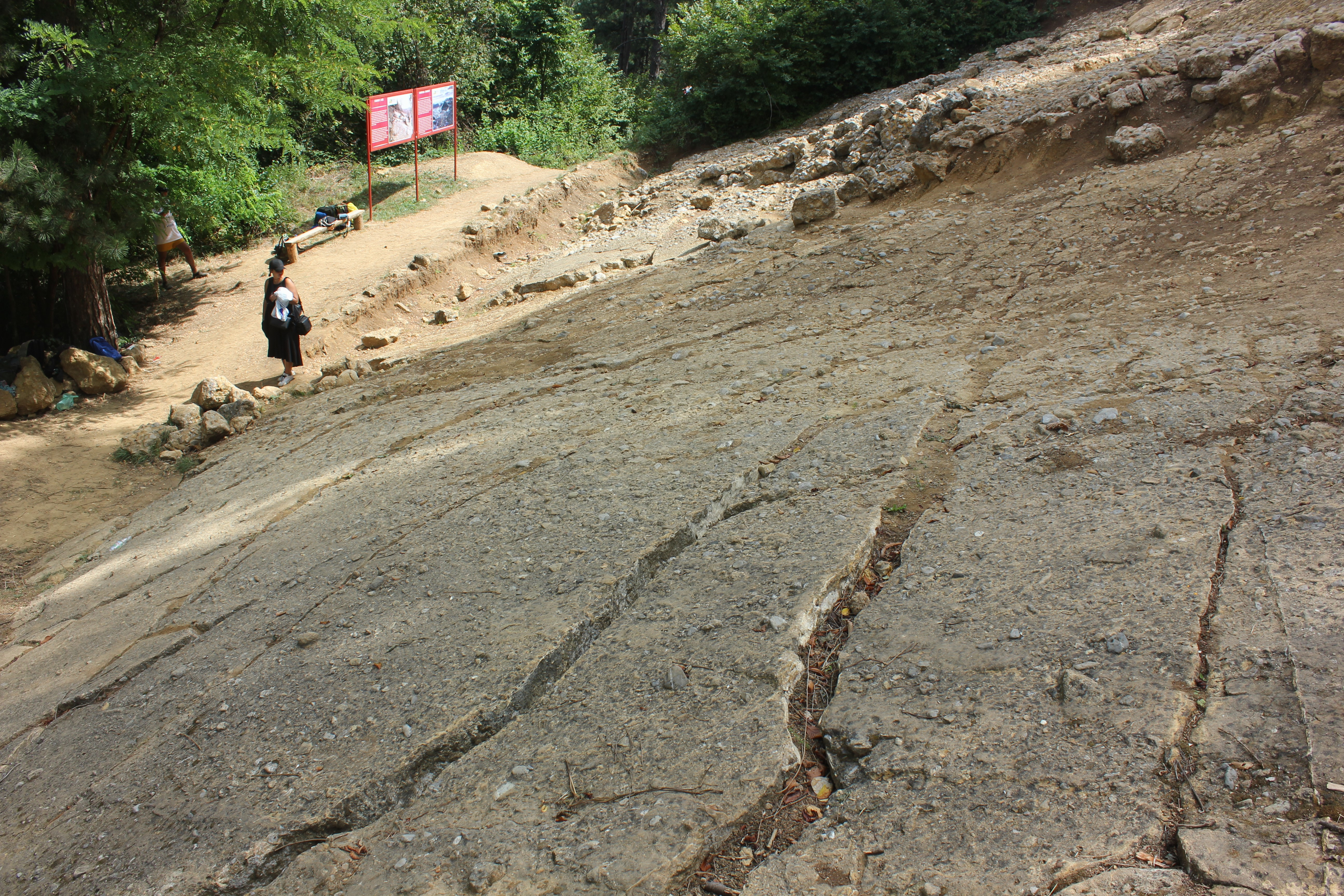 Brekzievon Visoko